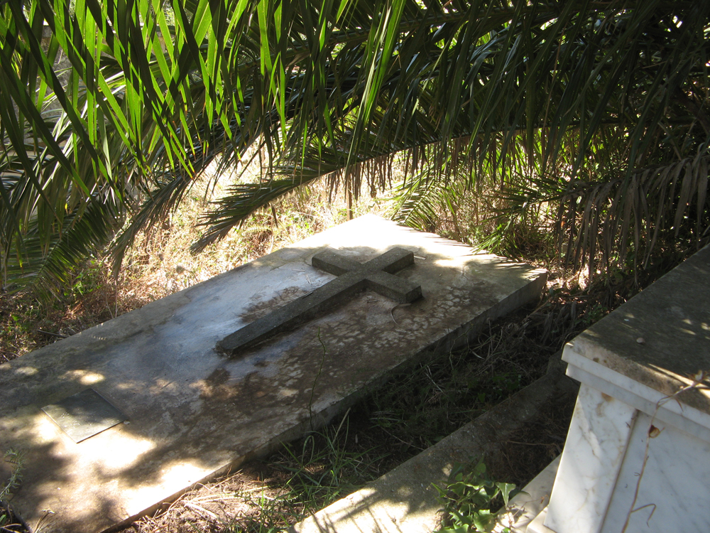 Tumba de Manuel Martínez de la Escalera (Cementerio Europeo de Bubana, Tánger, Marruecos). Fotografía: I. Izquierdo Moya.